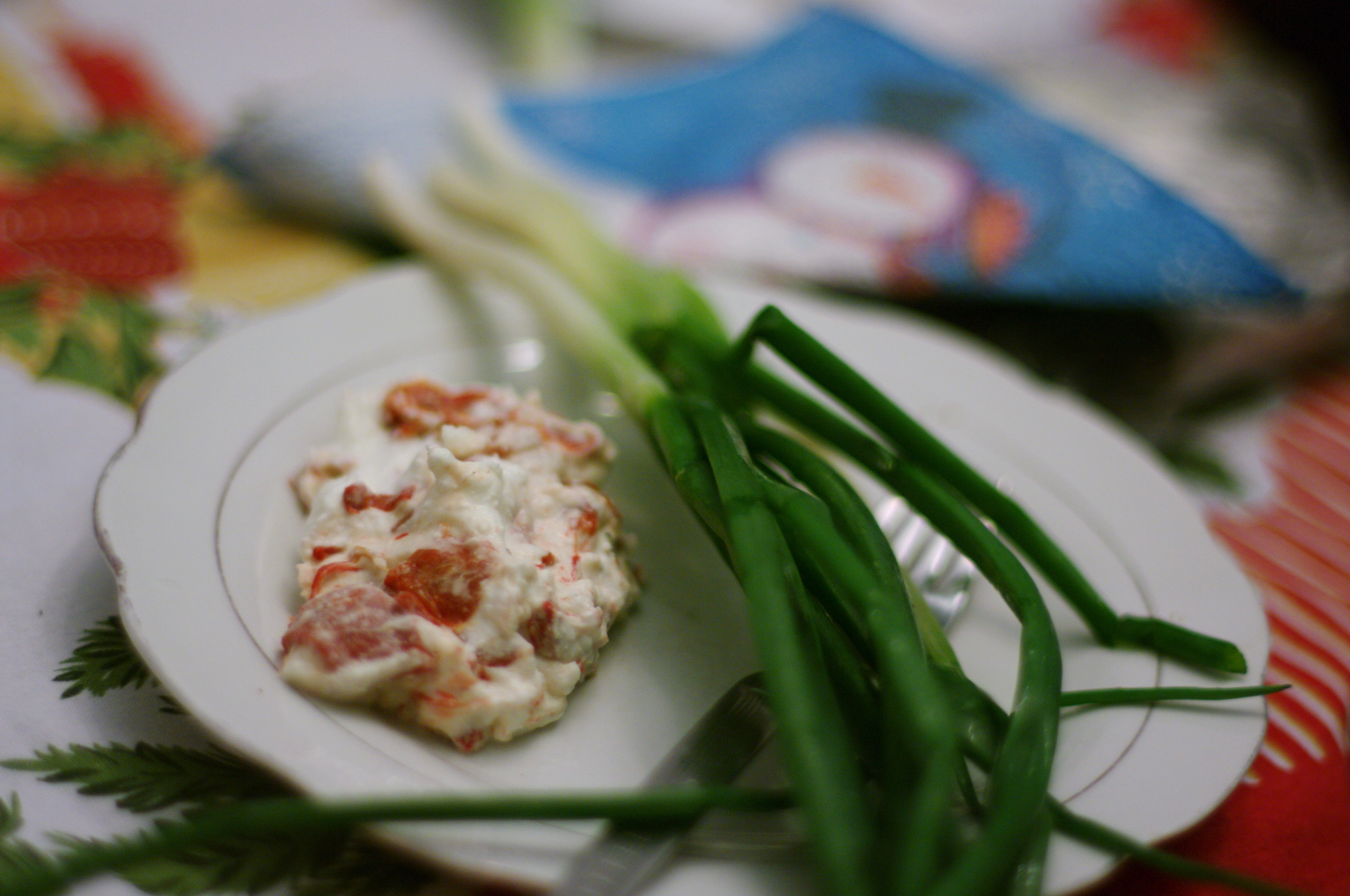 Катък аранжиран с печен червен пипер и стрък зелен лук.